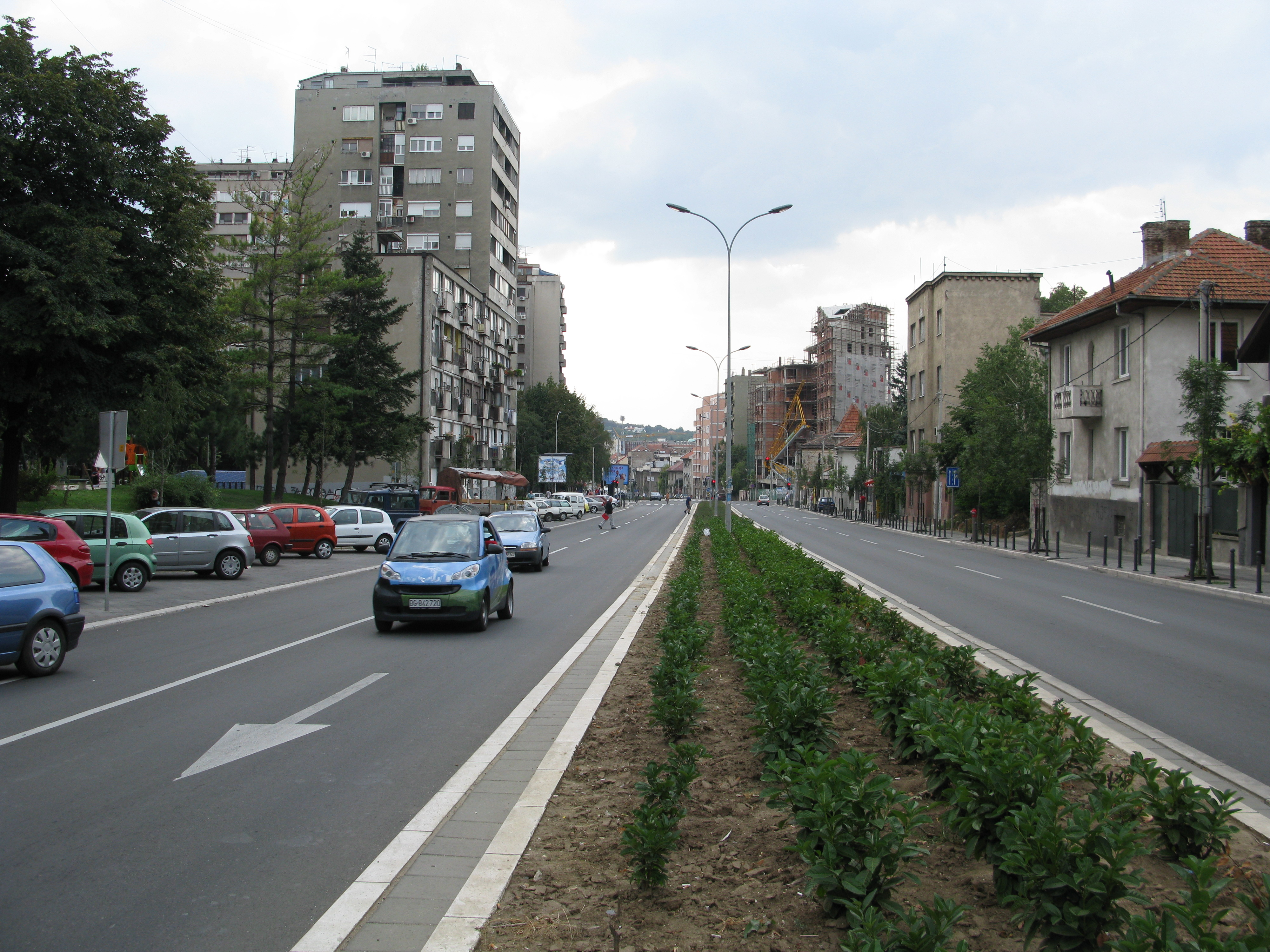 Neimar